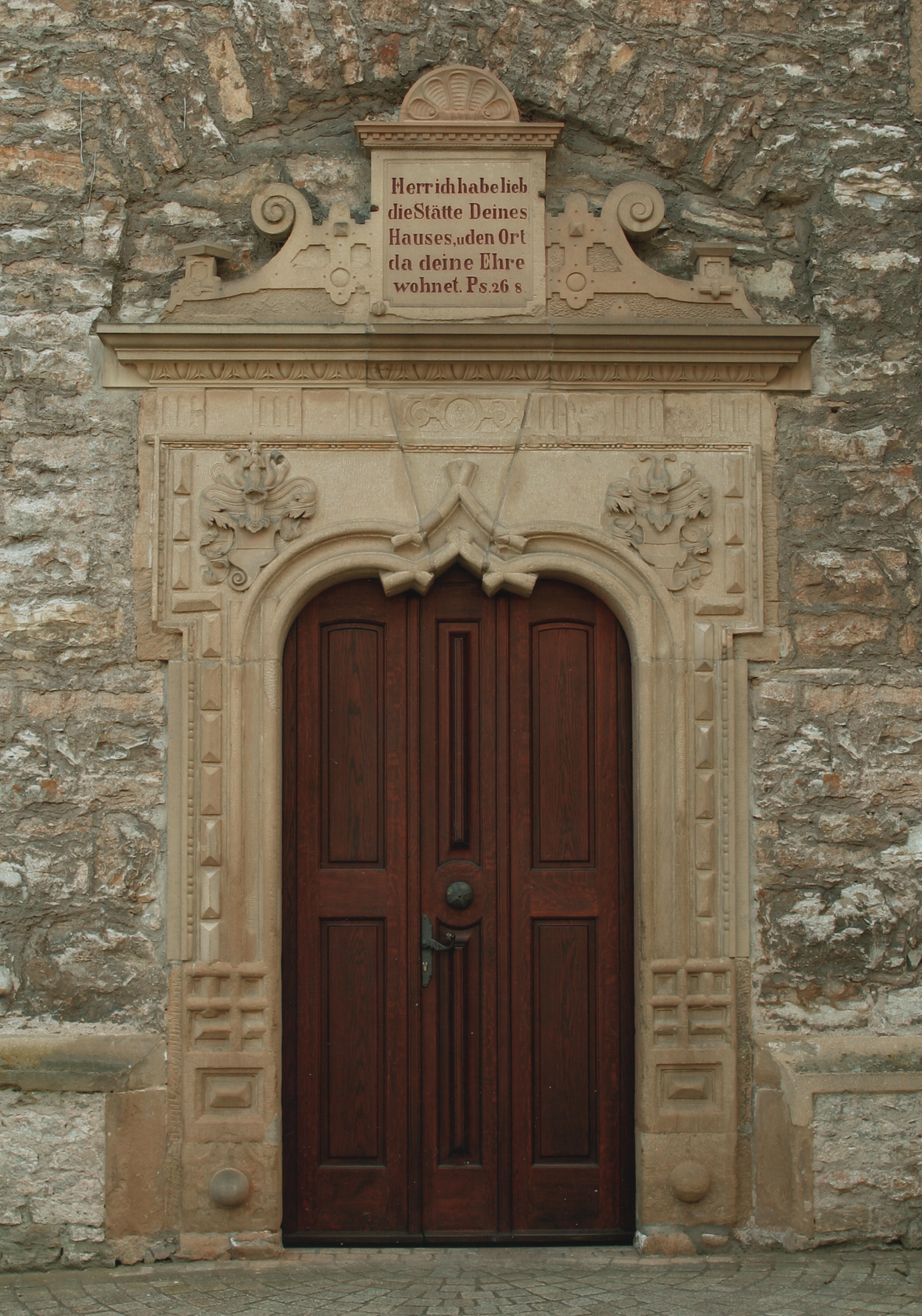 Portal des Seiteneingangs der Sebastianskirche